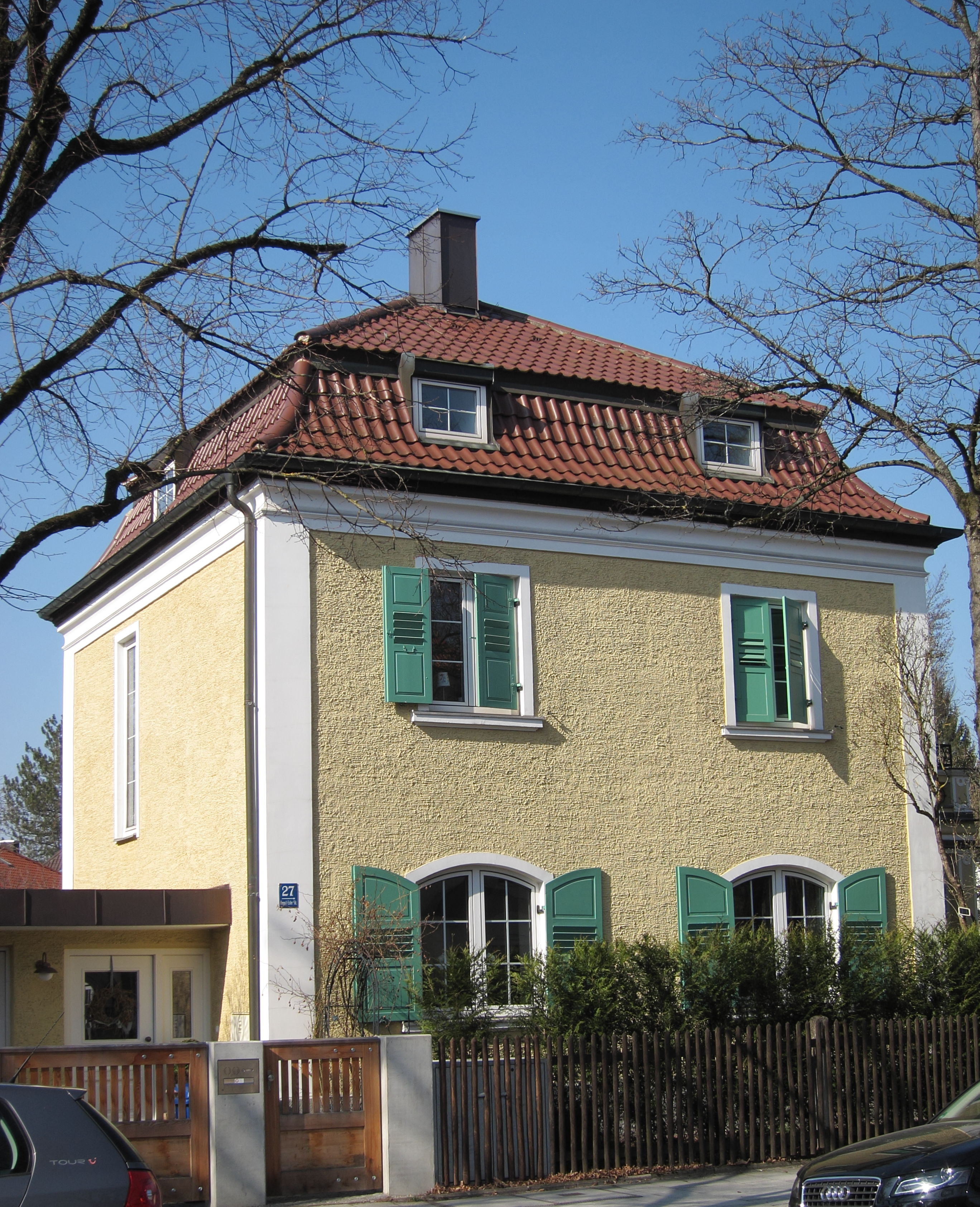 August-Exter-Straße 27; Villa, mit Mansarddach, um 1895 aus dem Büro August Exter.